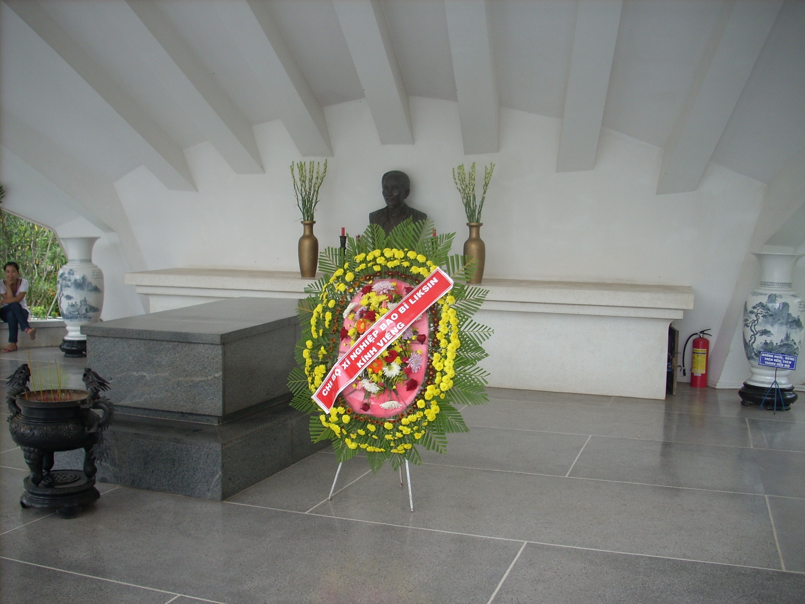 Tượng cụ Phó Bảng trong khu di tích Mộ cụ Nguyễn Sinh Sắc ở Đồng Tháp.